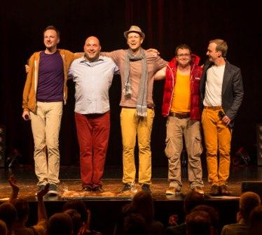 Füenf live Bock drauf